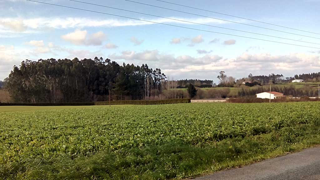 Vista da Carballosa, Castro, Narón.